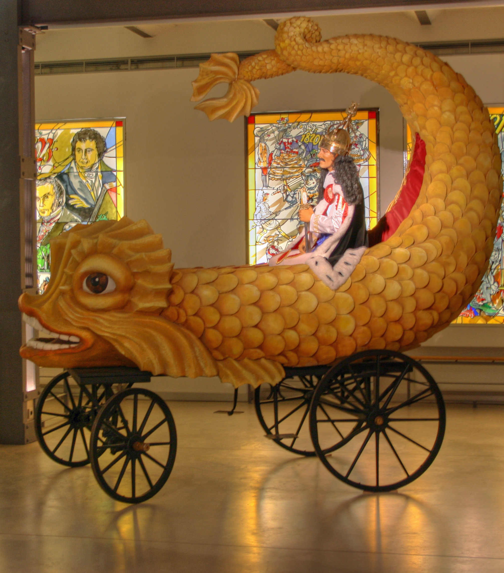 Der Kölner "Held Carneval" aus dem Jahre 1824; Nachbildung im Kölner Karnevalsmuseum